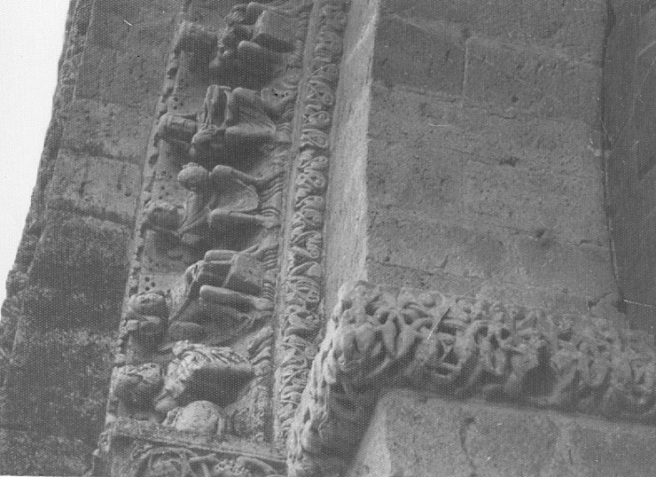 Iglesia de Santiago. Esculturas 1971 - Carrión de los Condes (Palencia) - Fotografía. Papel 750 x 105 mm B/N